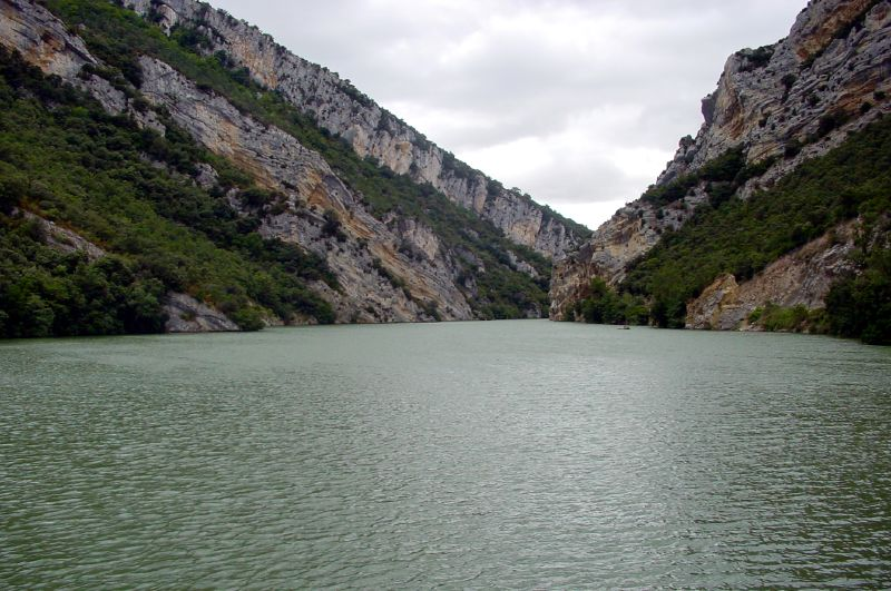 Sobrongo urtegia.